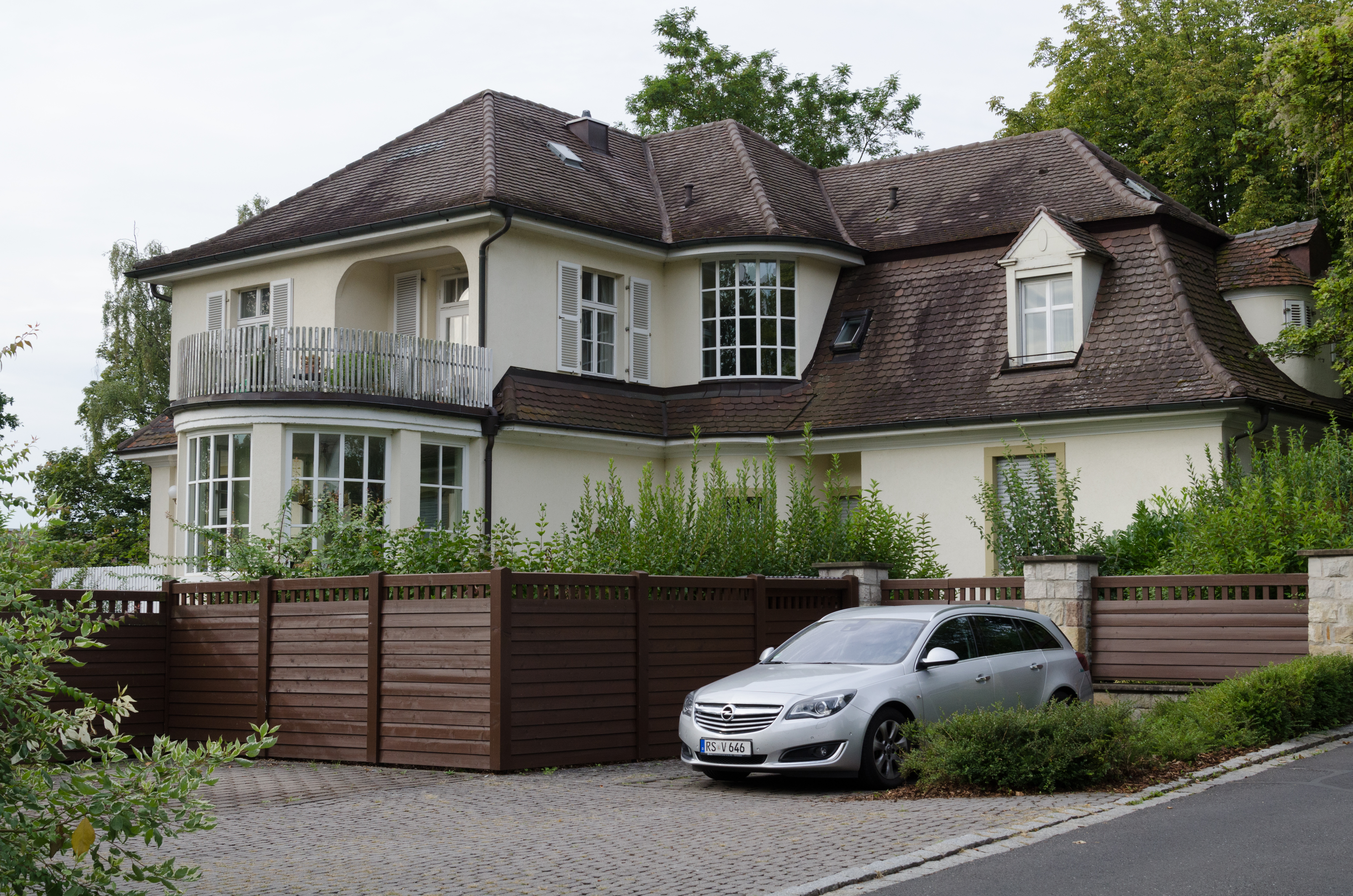 Schweinfurt, Am Löhlein 2